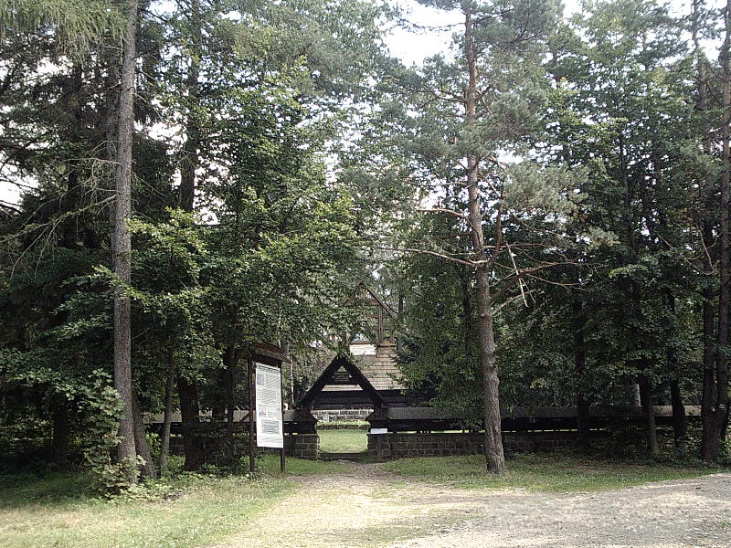 Cmentarz nr 60 na Przełęczy Małastowskiej autorstwa Duszana Jurkowicza